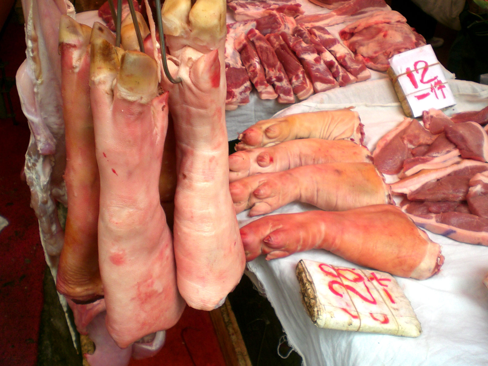 觀塘瑞和街街市豬腳